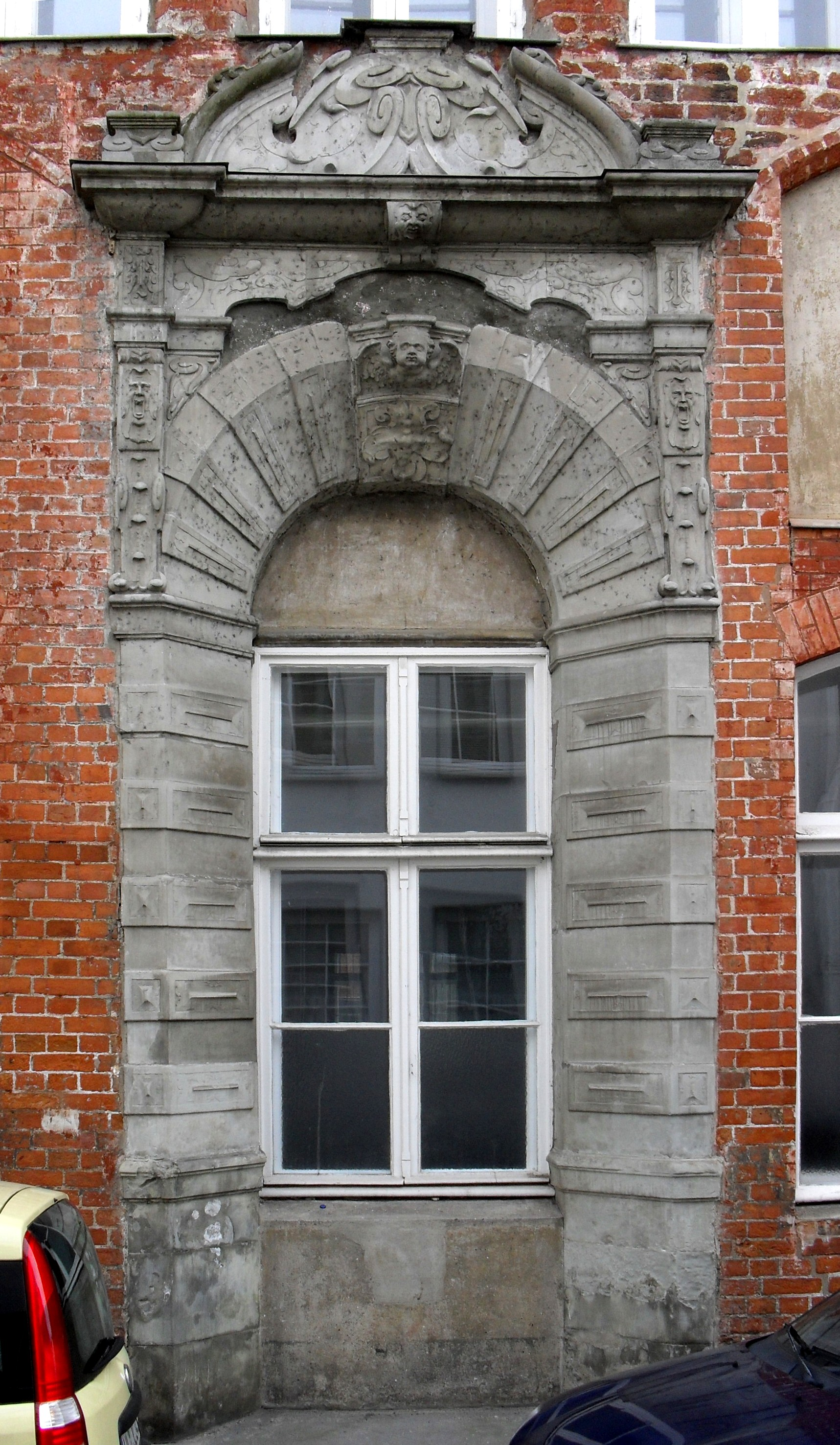 Sandsteinportal des Hauses Schildstraße 10 in Lübeck